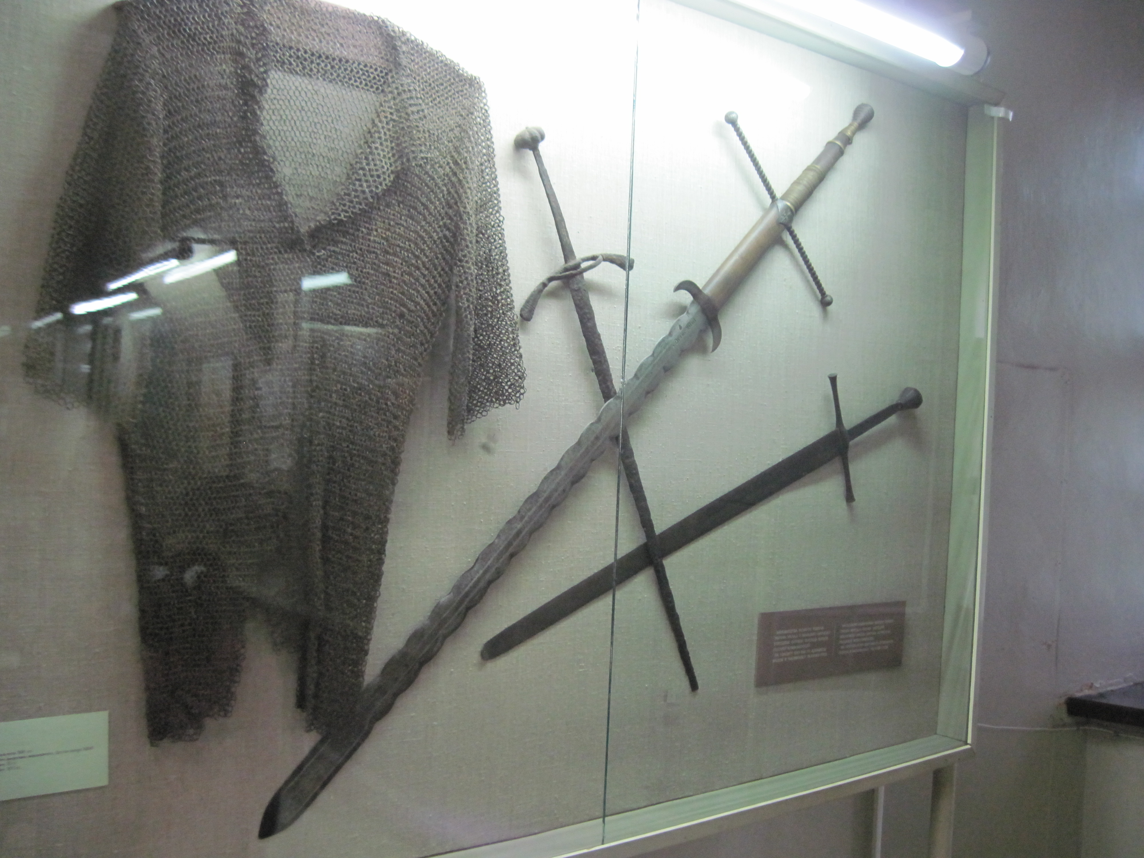 Рыцарскае ўзбаенне. Экспазіцыя Старога замку ў Гродна.